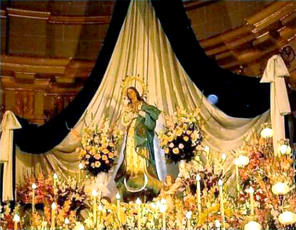 Imagen de la Inmaculada Purísima, patrona de Monforte del Cid, en las Fiestas de Moros y Cristianos